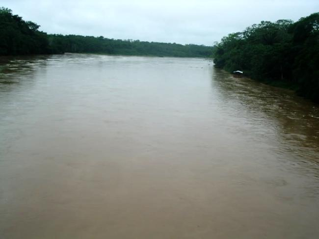 RO PUTUMAYO